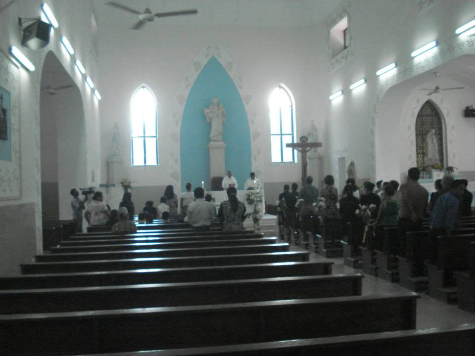 Dili